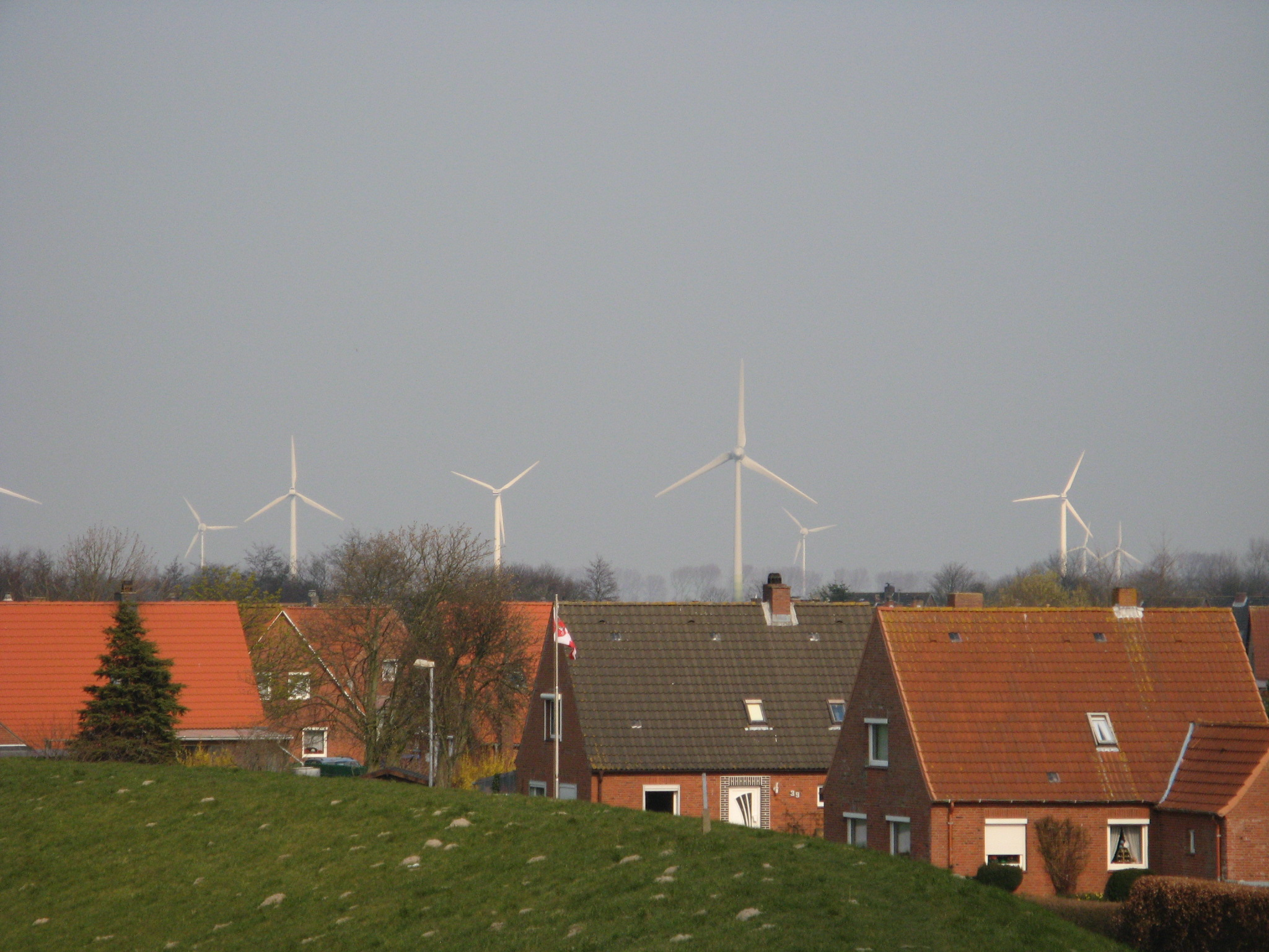 Sicht vom Friedrichskooger Hafendeich